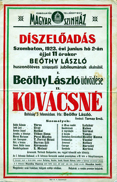 Beöthy László jubileumán 1923-ban az igazgató darabját mutatta be a Magyar Színház.